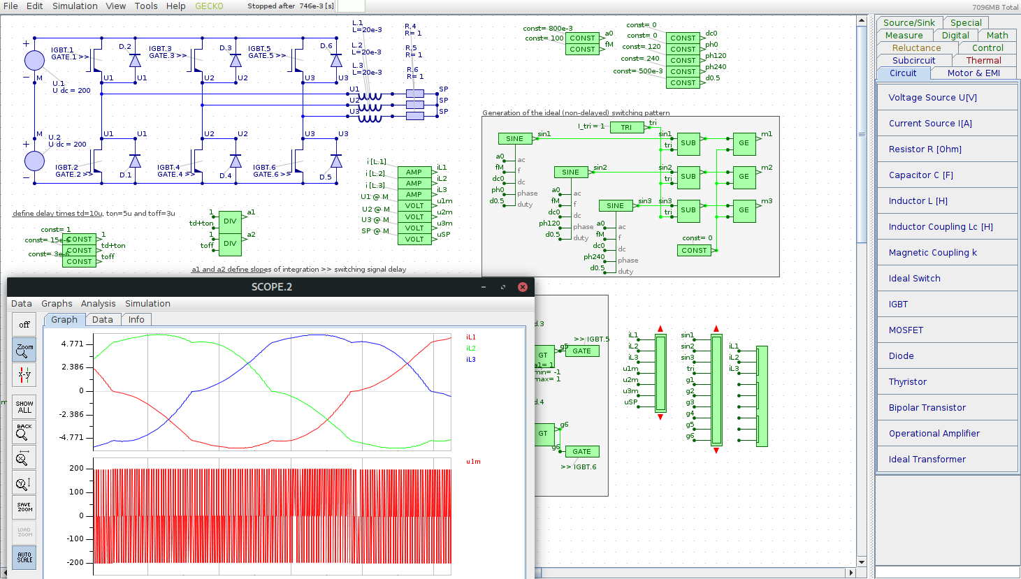 Screenshot von GeckoCircuits v2.00, GPLv3.